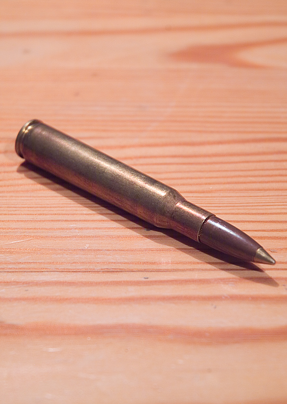 Kulpatron